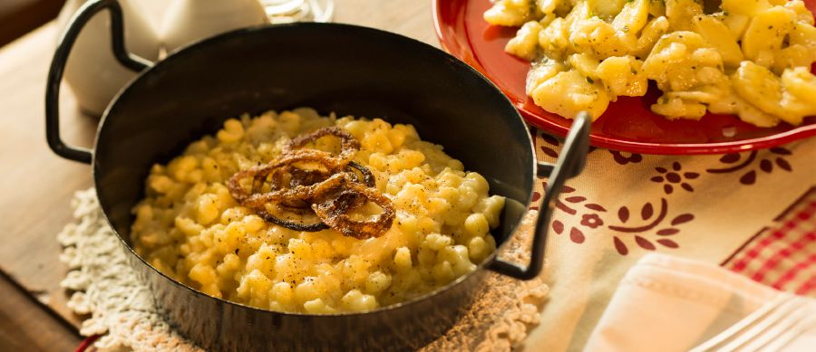 nje gatim kryesor ne Lihtenshtajn